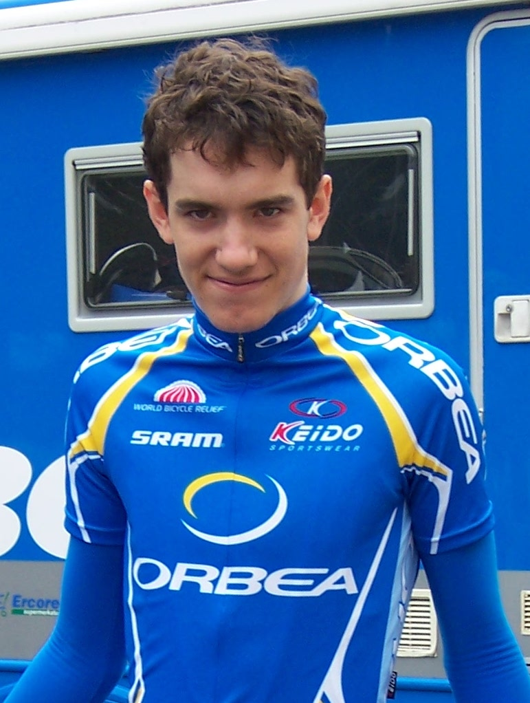 Romain Sicard, cycliste de l'équipe Orbea, lors de la première étape de la Ronde de l'Isard (22/05/2009). Photo prise avant le départ à Saint-Girons (Ariège 09, France)